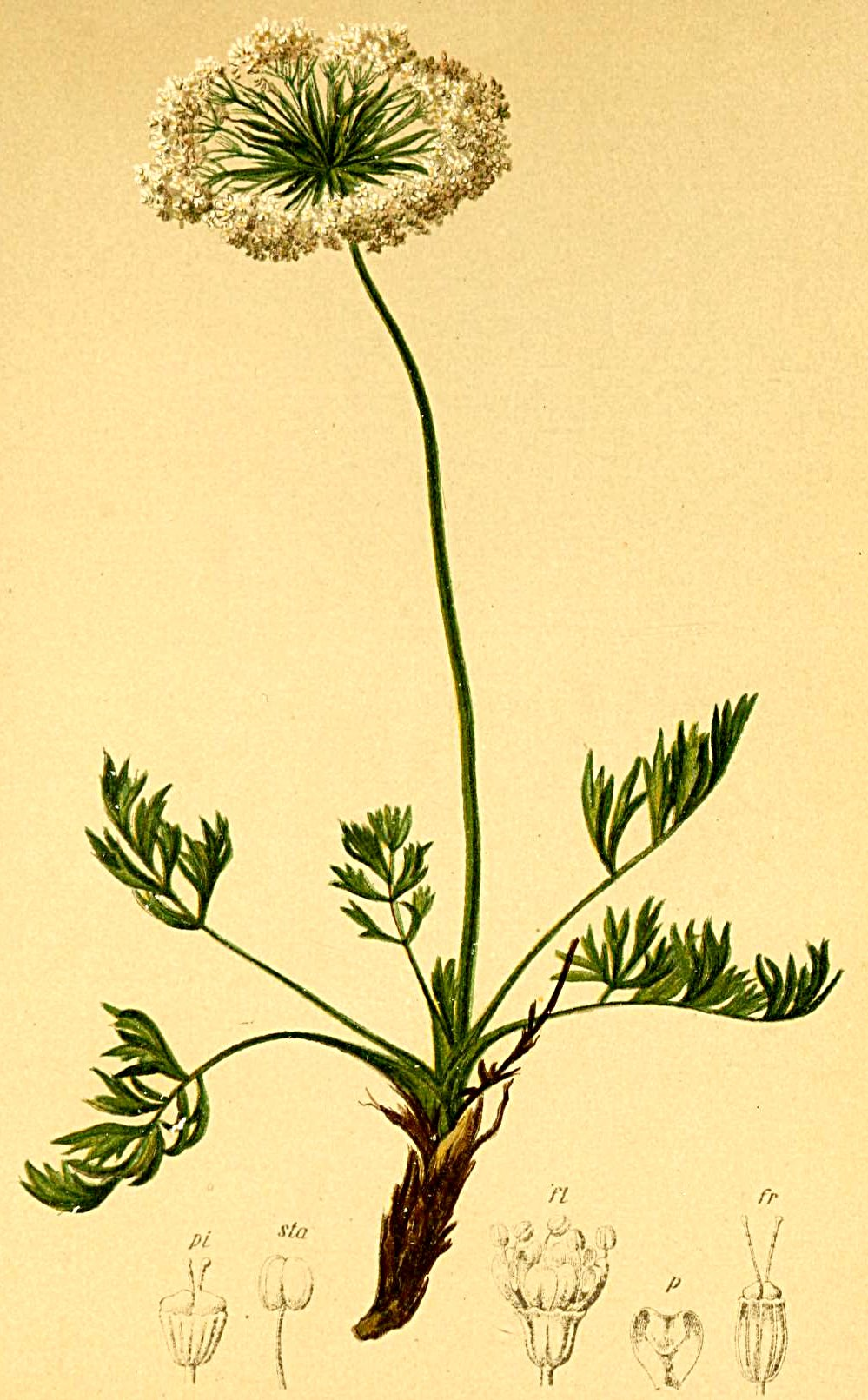 Pachypleurum simplex (Pachypleurum mutellinoides)